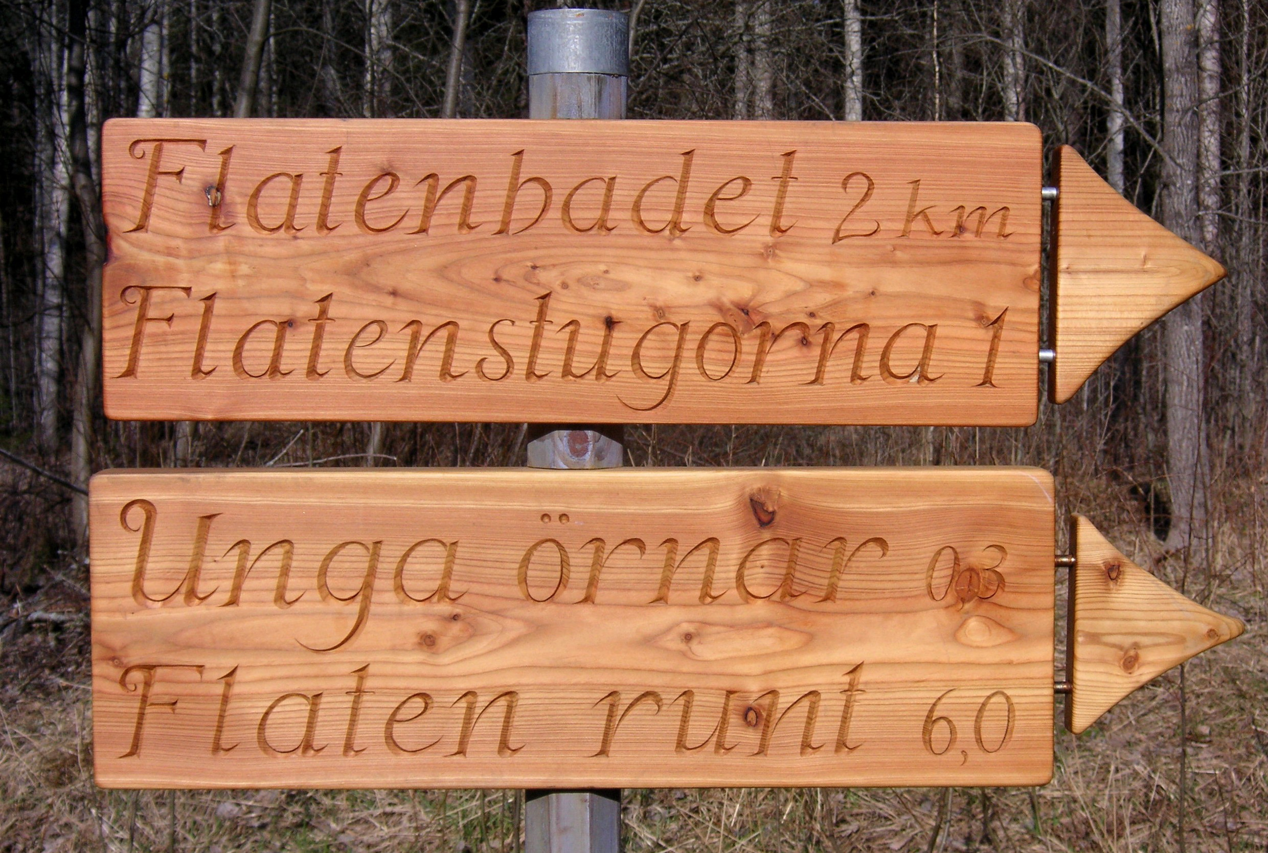 Vägvisare i Flatens naturreservat